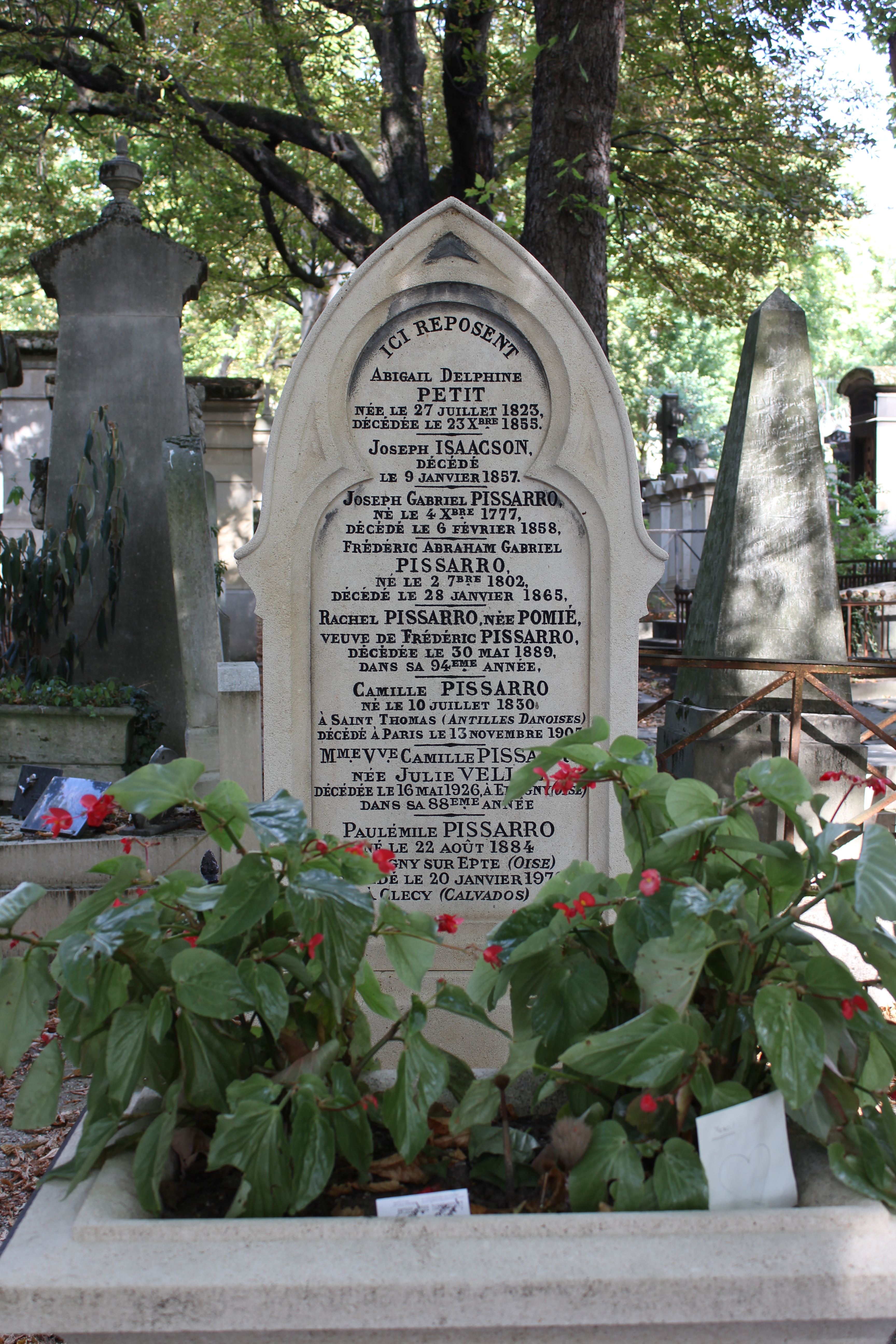 Stèle